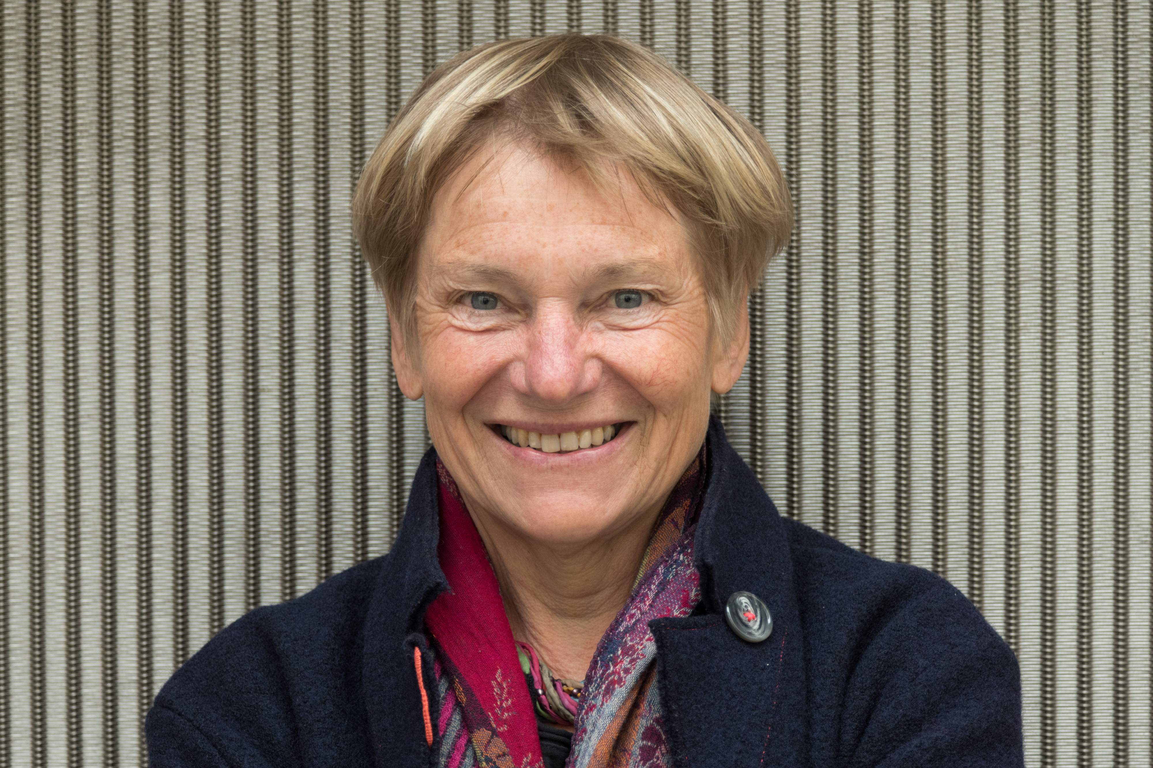 Ulrike Böker bei Crossing Europe 2019 in Linz